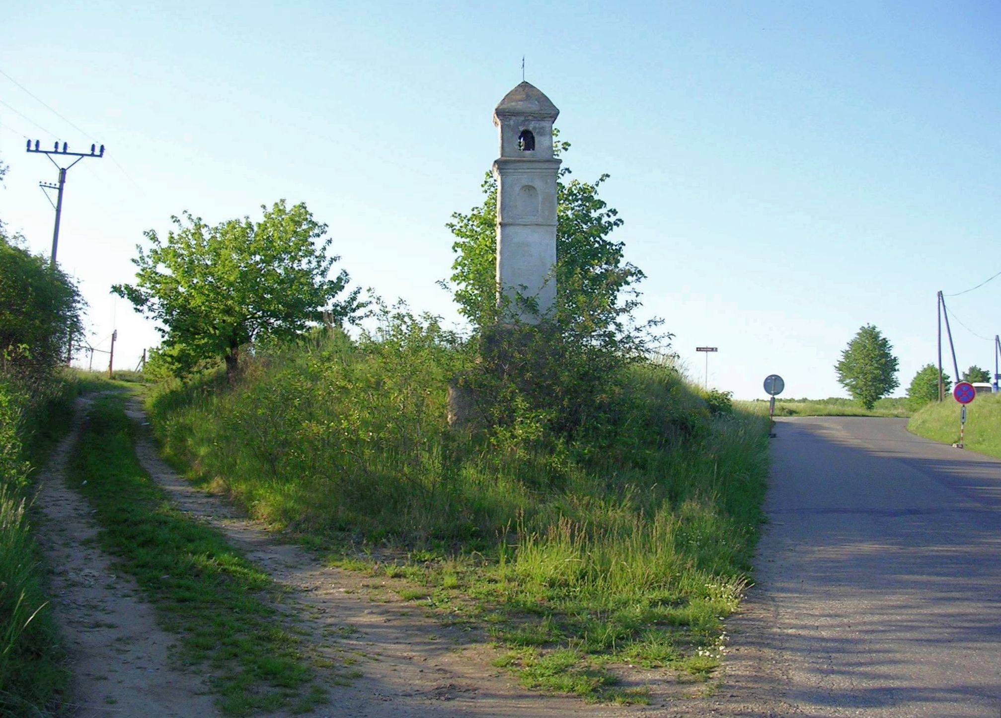 Boží muka na kraji Prčice (město Sedlec-Prčice), u odbočení cesty k židovskému hřbitovu od silnice na Heřmaničky. - Google Maps - Google Earth